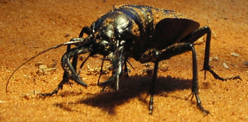 Manticora scabra (Cicindelidae) in Cologne Zoo, Germany.